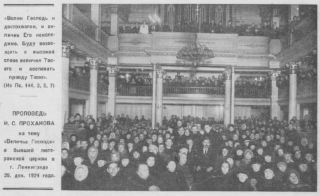 Проповедь Ивана Проханова (в центре), 1924 год